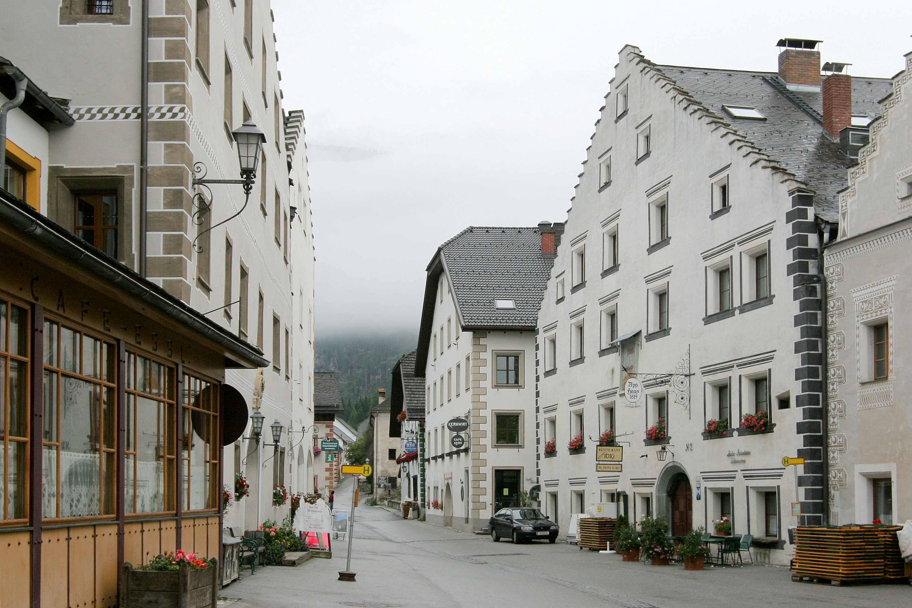 Ensemble um Bürgerhaus Markt 2 in Mauterndorf, ehem. Pfarrhof